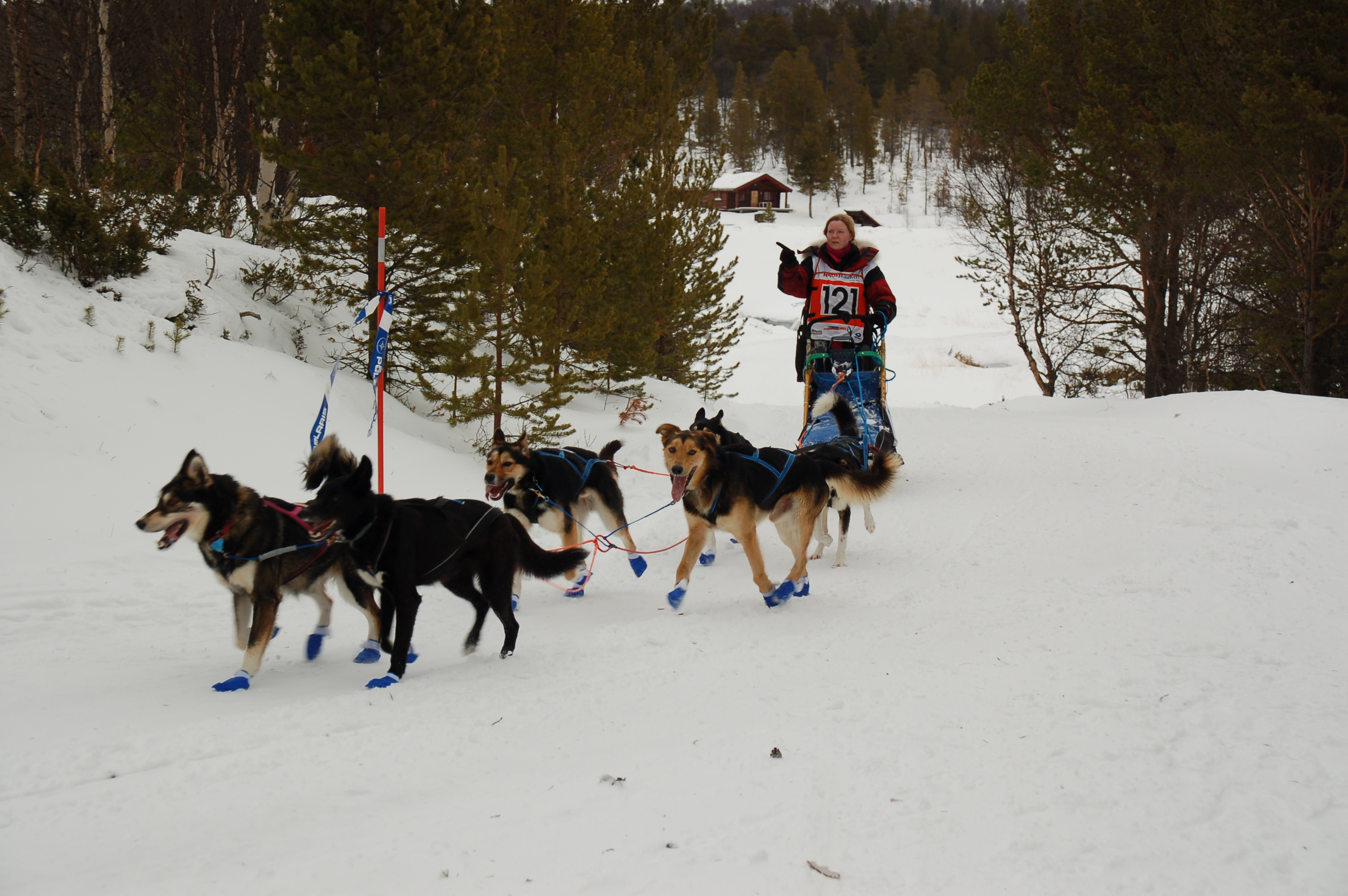 Runa E. Skyrud i klassen F400 passerer Essetrene i Tolga